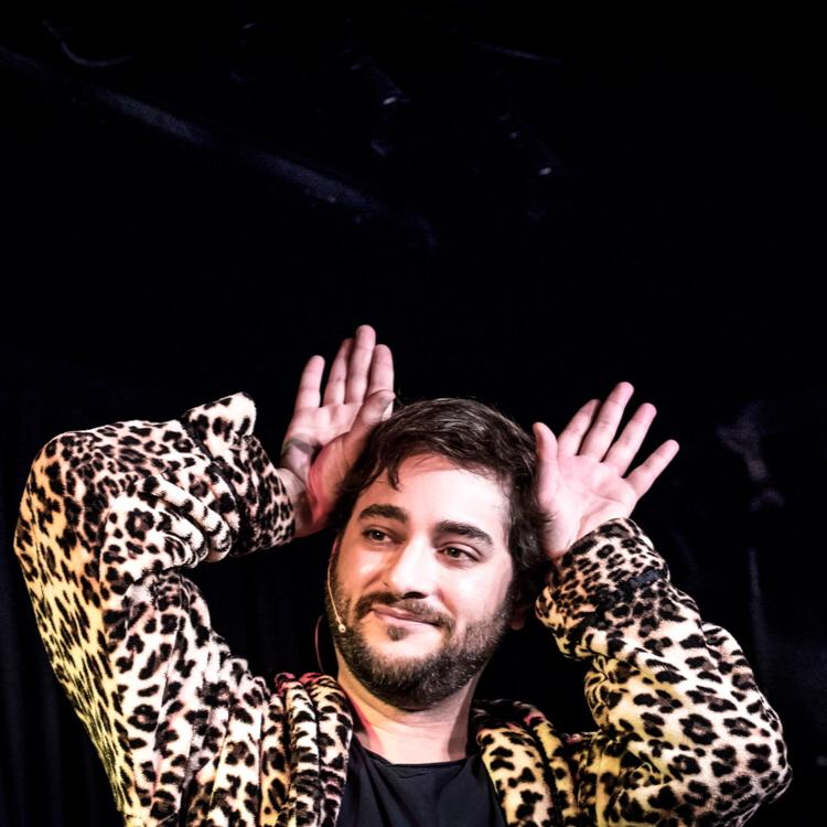 Homajon Sefat bei der Premiere von "Solo"